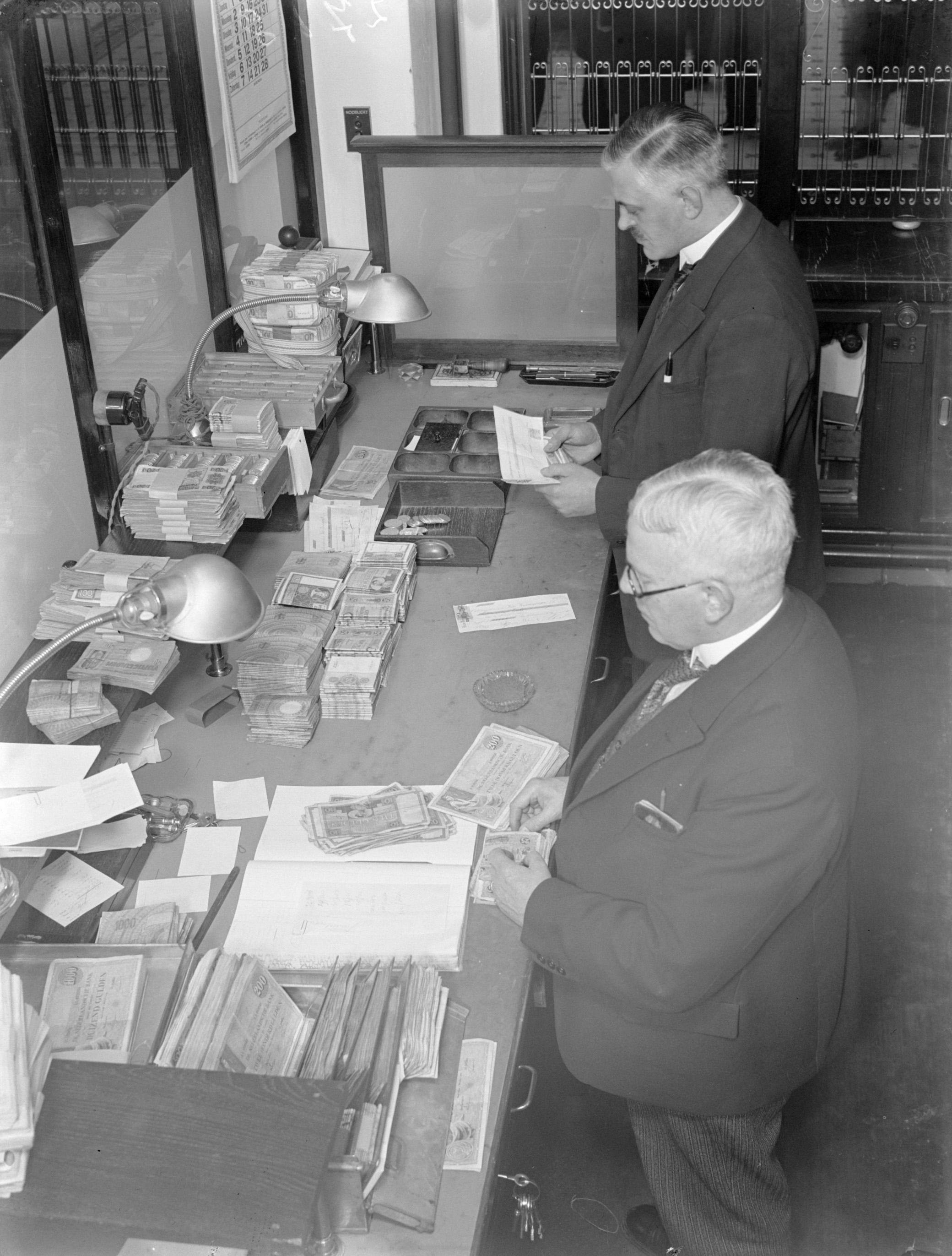 Collectie / Archief : Fotocollectie Van de Poll Reportage / Serie : Reportage Kasvereeniging Amsterdam Beschrijving : Kassiers Annotatie : De Kasvereeniging was en is gevestigd aan de Spuistraat 172 in Amsterdam. In 1952 veranderde de naam in Kas-Associatie, tegenwoordig heet de bank KAS BANK Datum : 1933 Locatie : Amsterdam, Noord-Holland Trefwoorden : administratief personeel Fotograaf : Poll, Willem van de, [onbekend] Auteursrechthebbende : Nationaal Archief Materiaalsoort : Glasnegatief Nummer archiefinventaris : bekijk toegang 2.24.14.02 Bestanddeelnummer : 189-0014